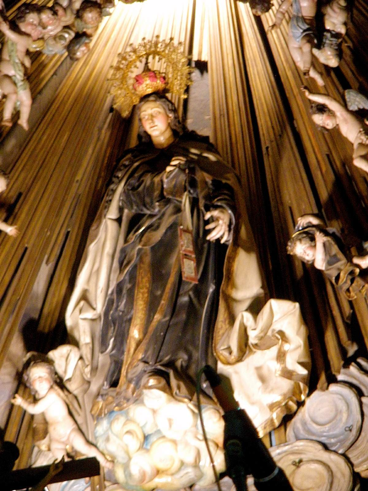 Iglesia del Carmen y San Luis (Madrid)